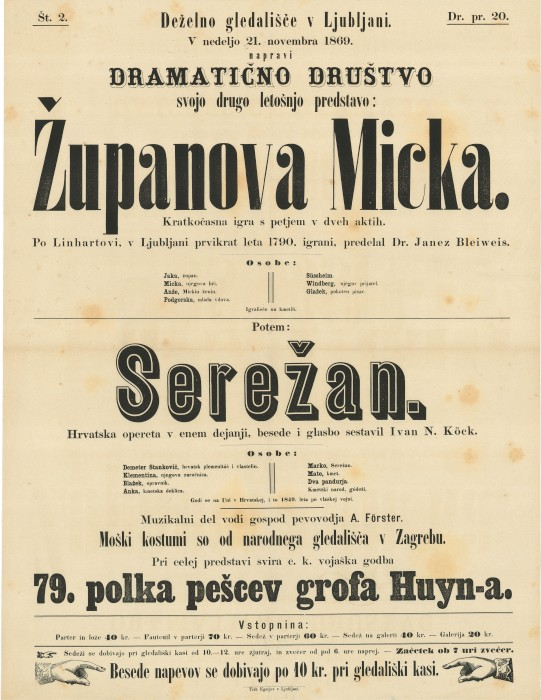 Plakat za predstavo Županova Micka v Deželnem gledališču